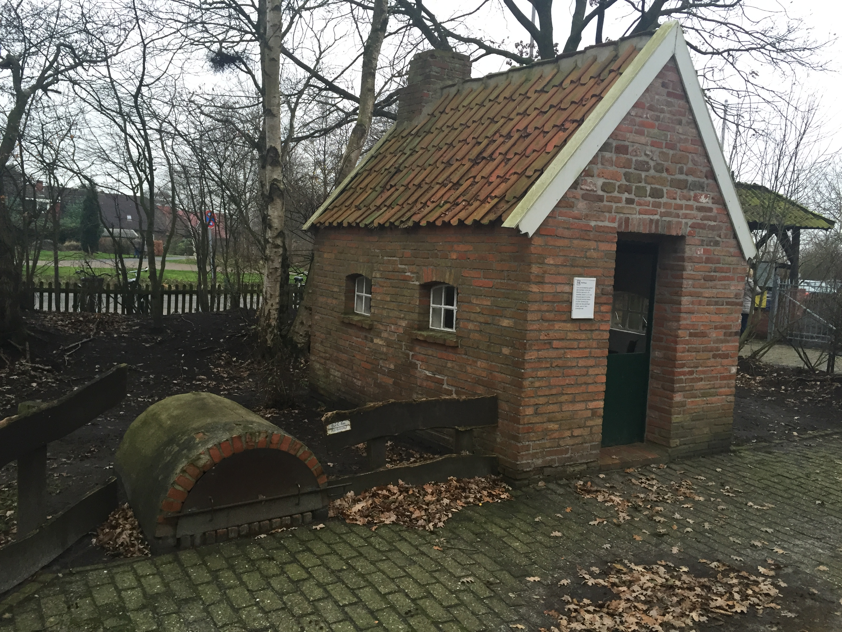 Kochaus un Brootbackofen im Moormusem Moordorf